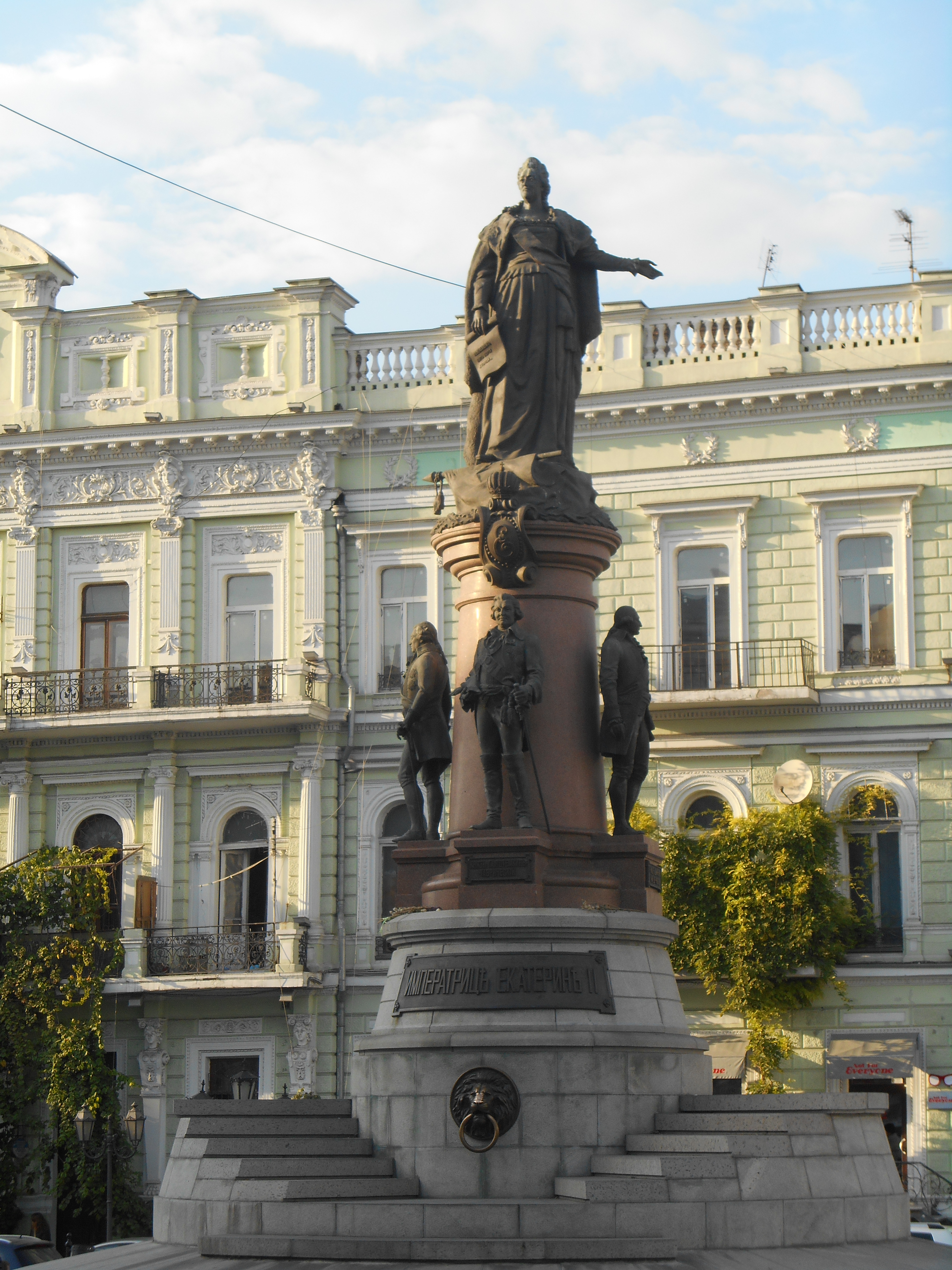 Одесса, Екатерининская площадь. Памятник "Основателям Одессы"